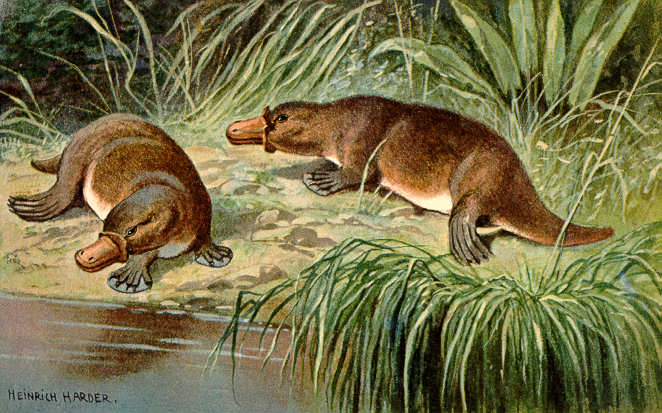 Duck Billed Platypus Schnabeltier